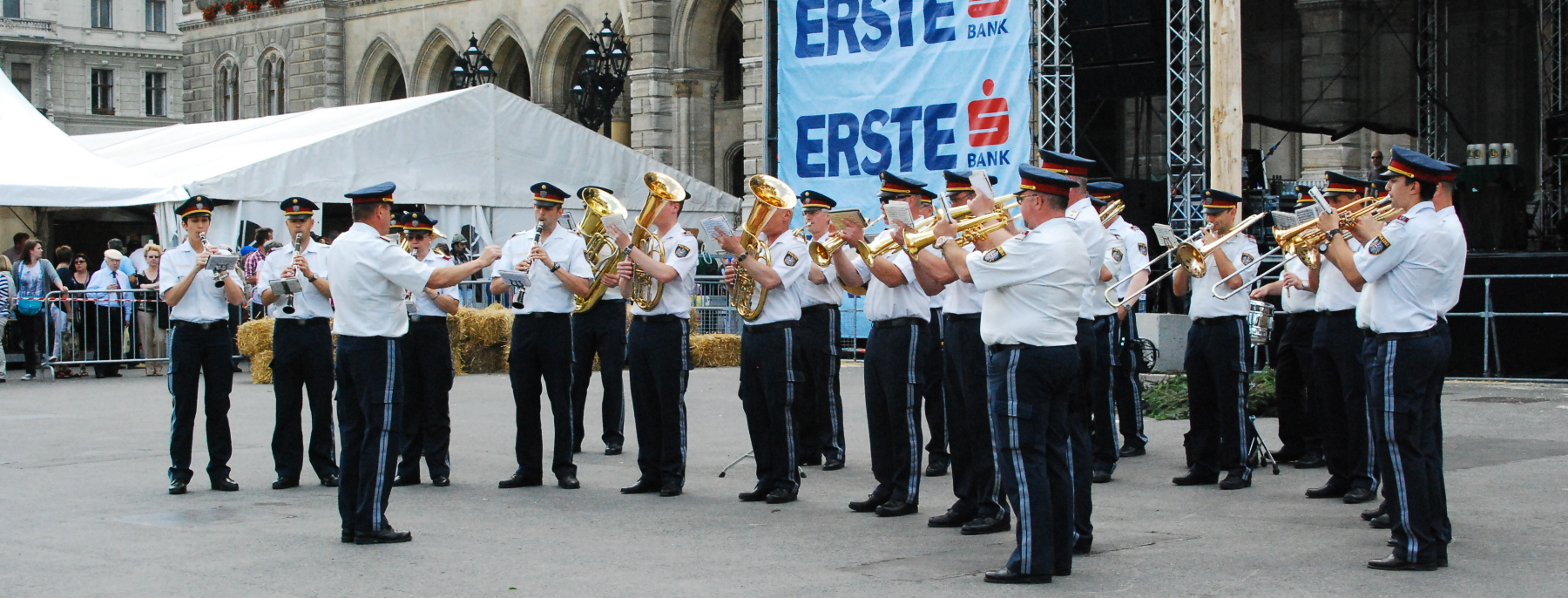 Die Polizeimusik Wien auf dem Wiener Rathausplatz